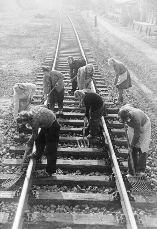 ADN-ZB/Donath Deutschland, Sept. 1948 (sowjetische Besatzungszone) Bahnbau der Strecke Schwaan-Rostock, der sogenannten "Jugendbahn". Jugendliche aus allen Berufen folgten dem Aufruf der Arbeitsämter, um beim Bau dieser wichitgen Bahnstrecke zu helfen.